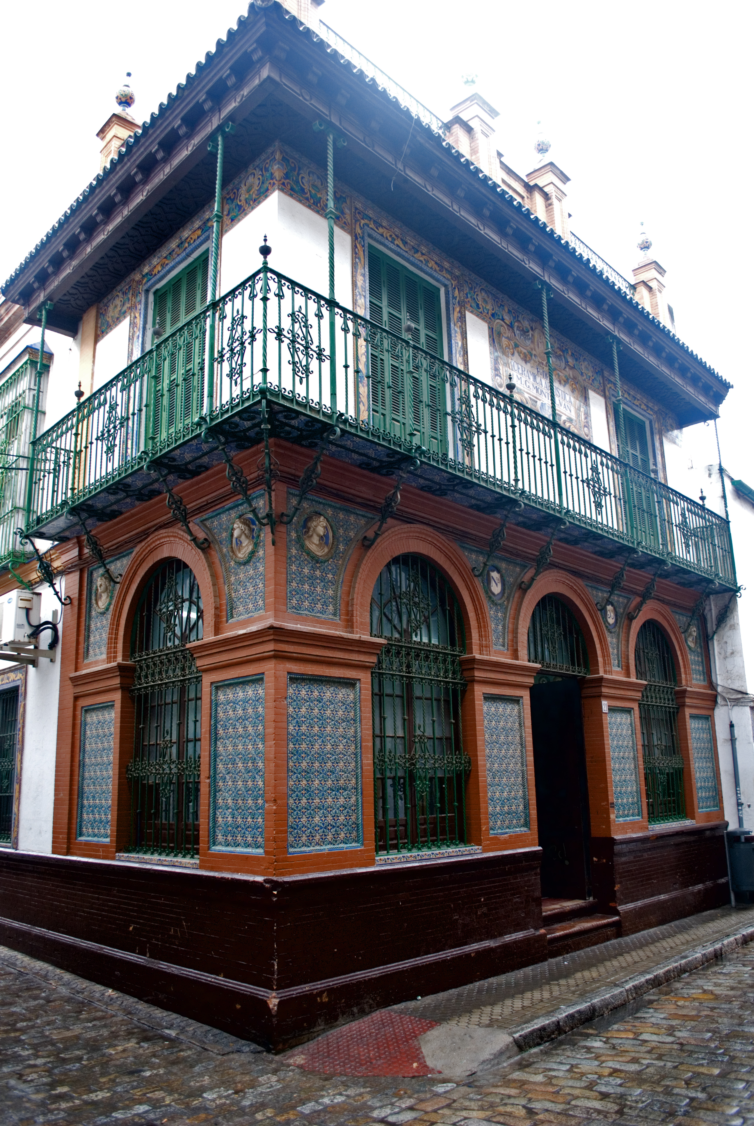 Casa para Manuel García Montalván (1924-1926): Calle Alfarería, 11. Sevilla. Arquitecto Juan Talavera y Heredia